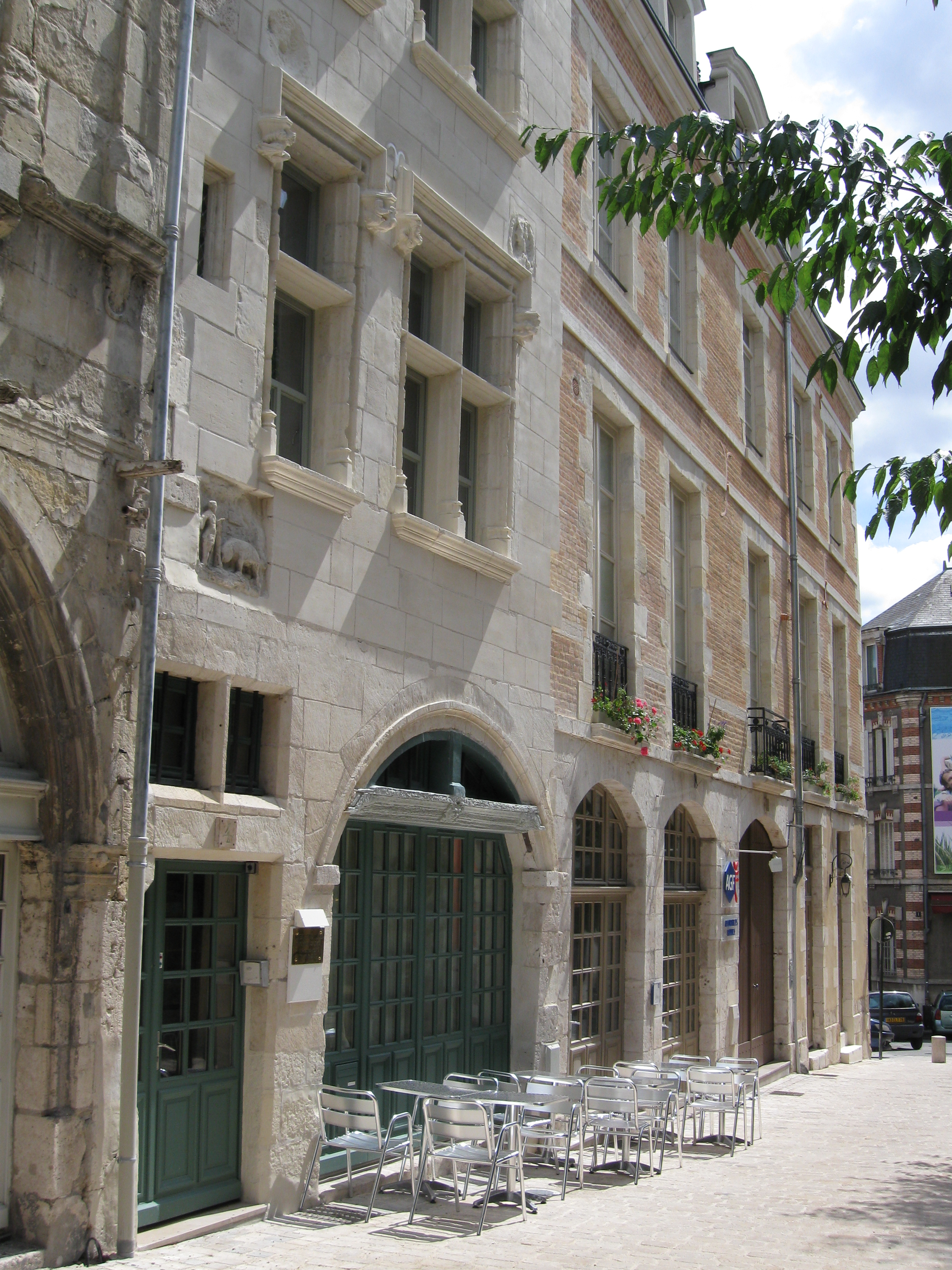 Maisons anciennes restaurées, place du Châtelet, Orléans, Loiret, France